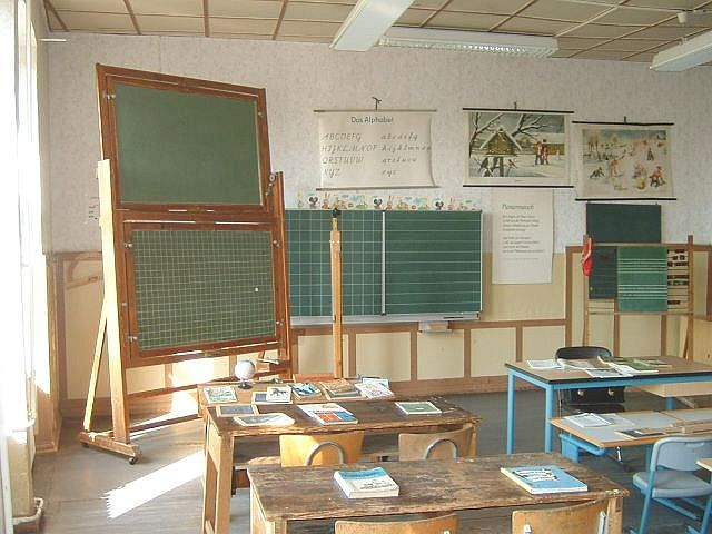 Klassenzimmer im Burgmuseum in Wredenhagen (Mecklenburg-Vorpommern) mit Gegenständen aus der Zeit von 1900 bis 1985, links eine bewegliche Schiebetafel, im Hintergrund Schaubilder und das Alphabet, in der Mitte ein Kartenständer